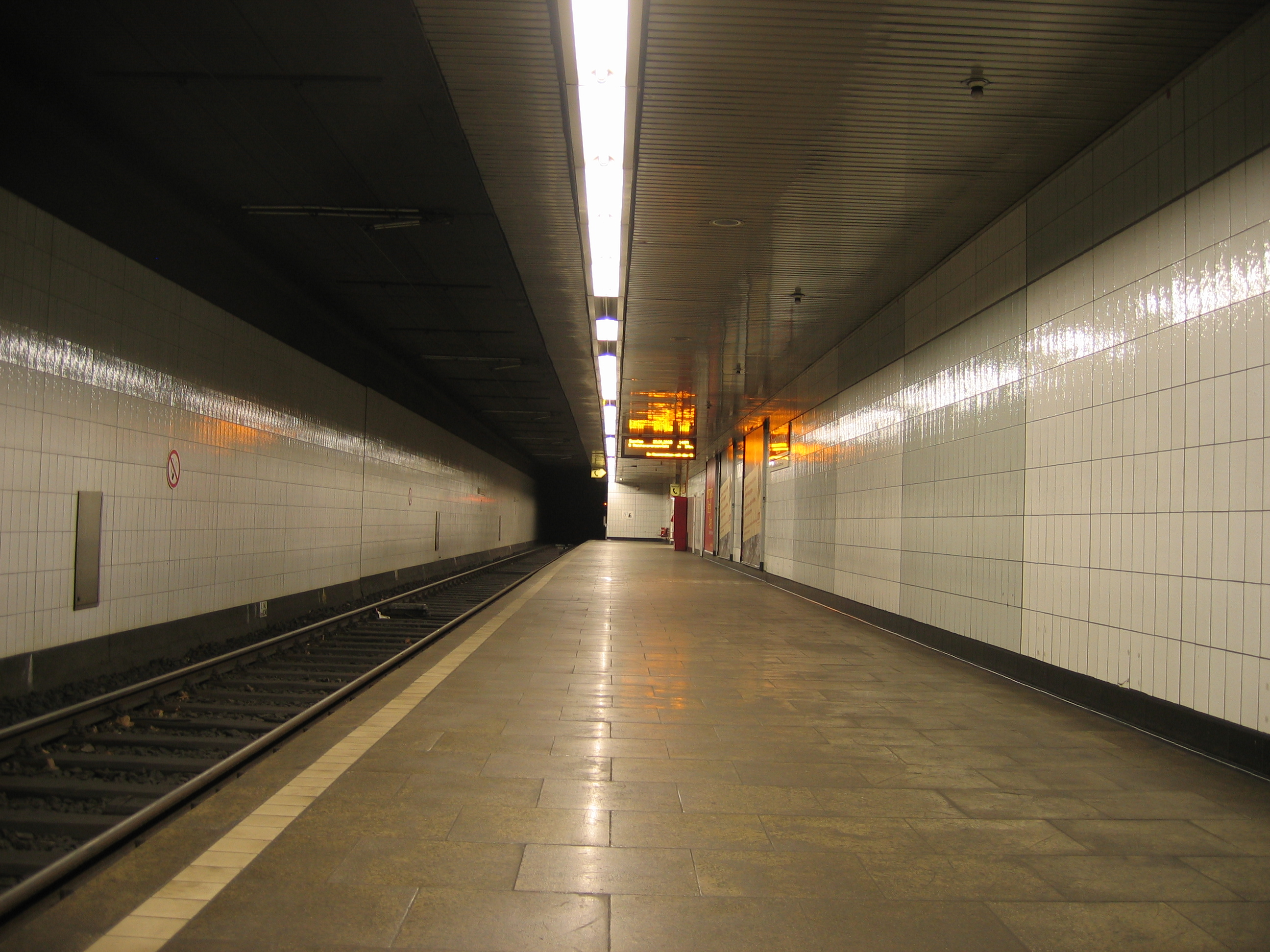 U-Bahn-Station Appellhoffplatz (Zeughaus) der Stadtbahn Köln